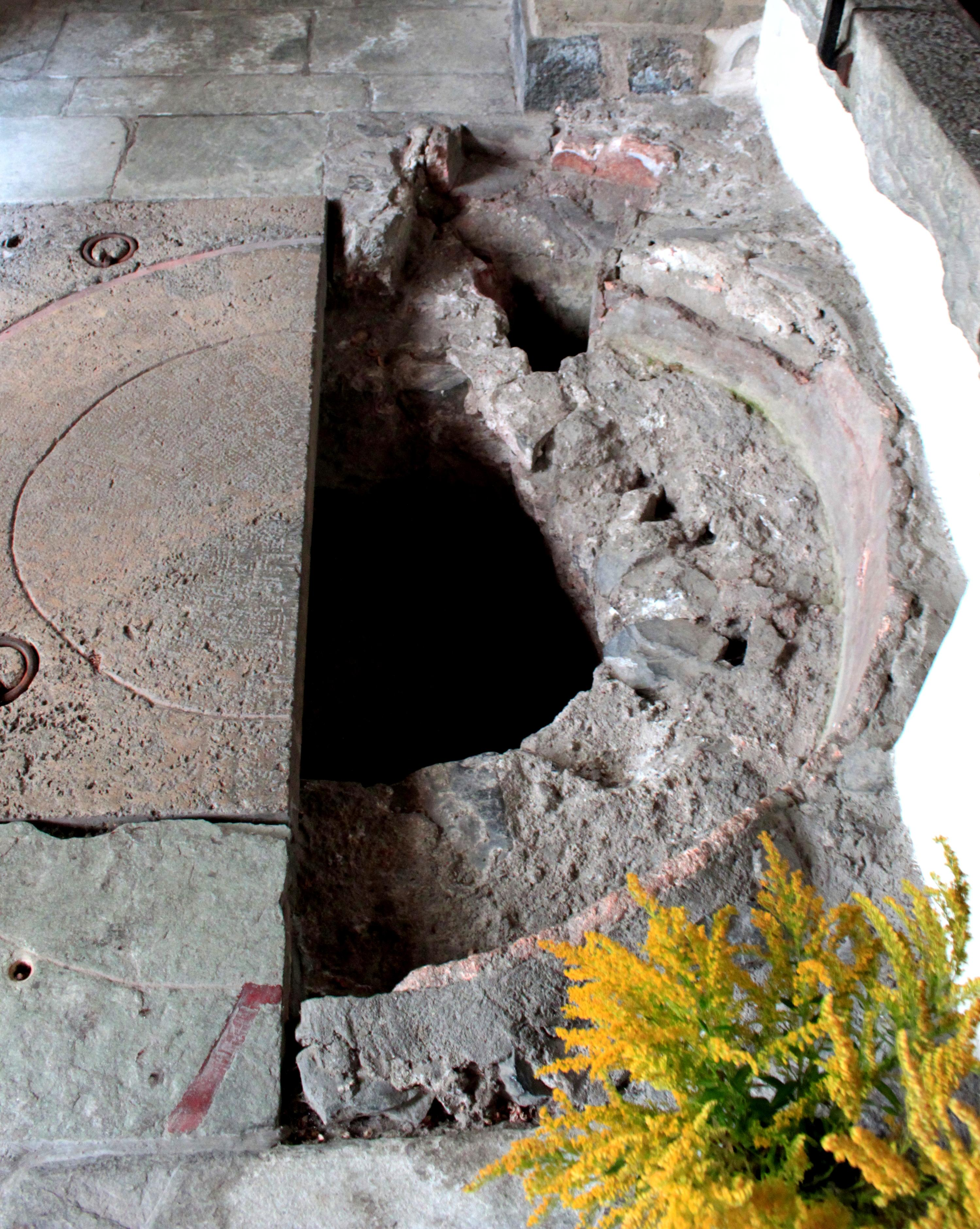 Suisse, canton du Valais, Saint-Maurice, Abbaye, vue du baptistère médiéval.